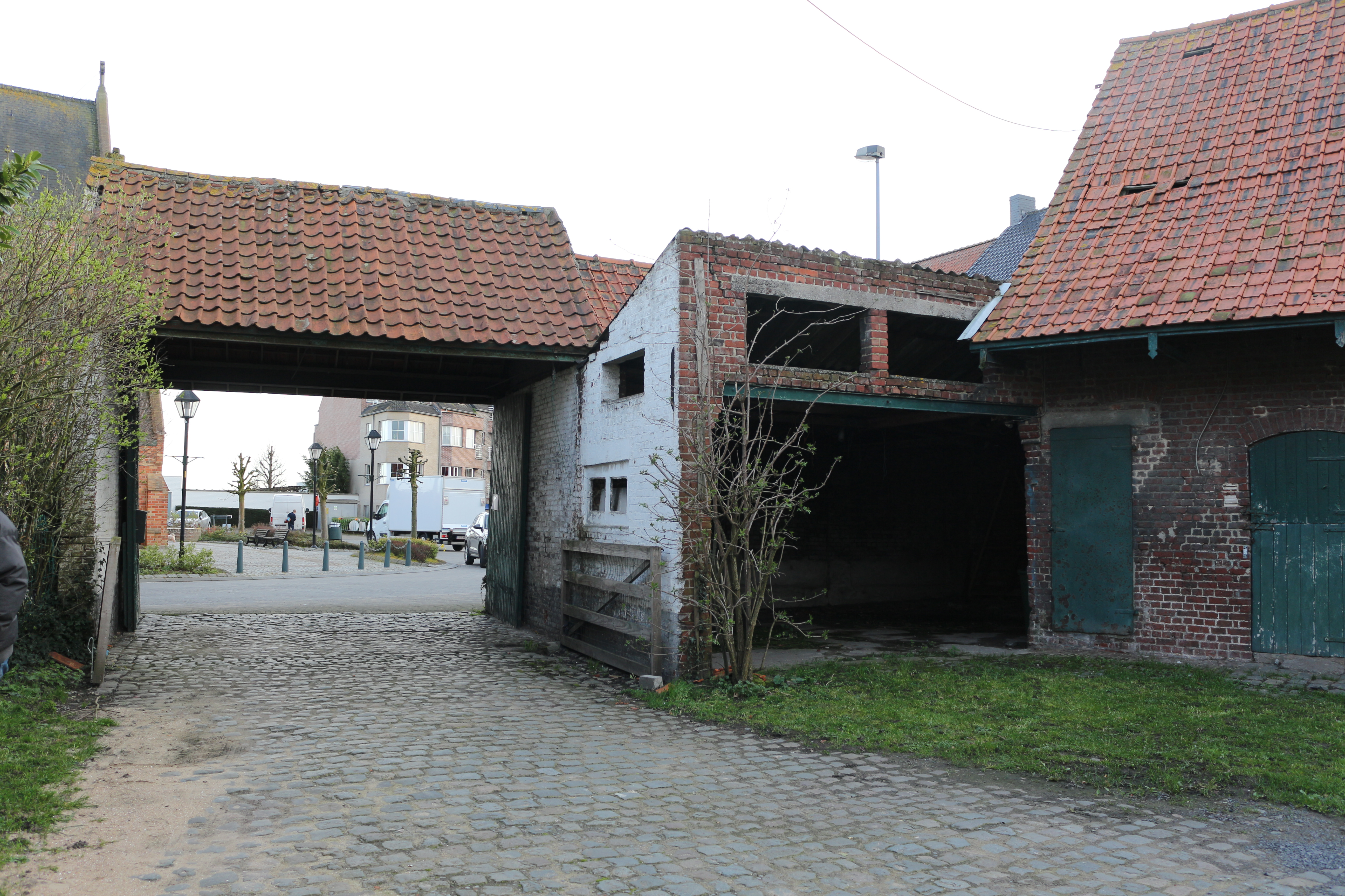 Poortgebouw vanaf het binnenhof